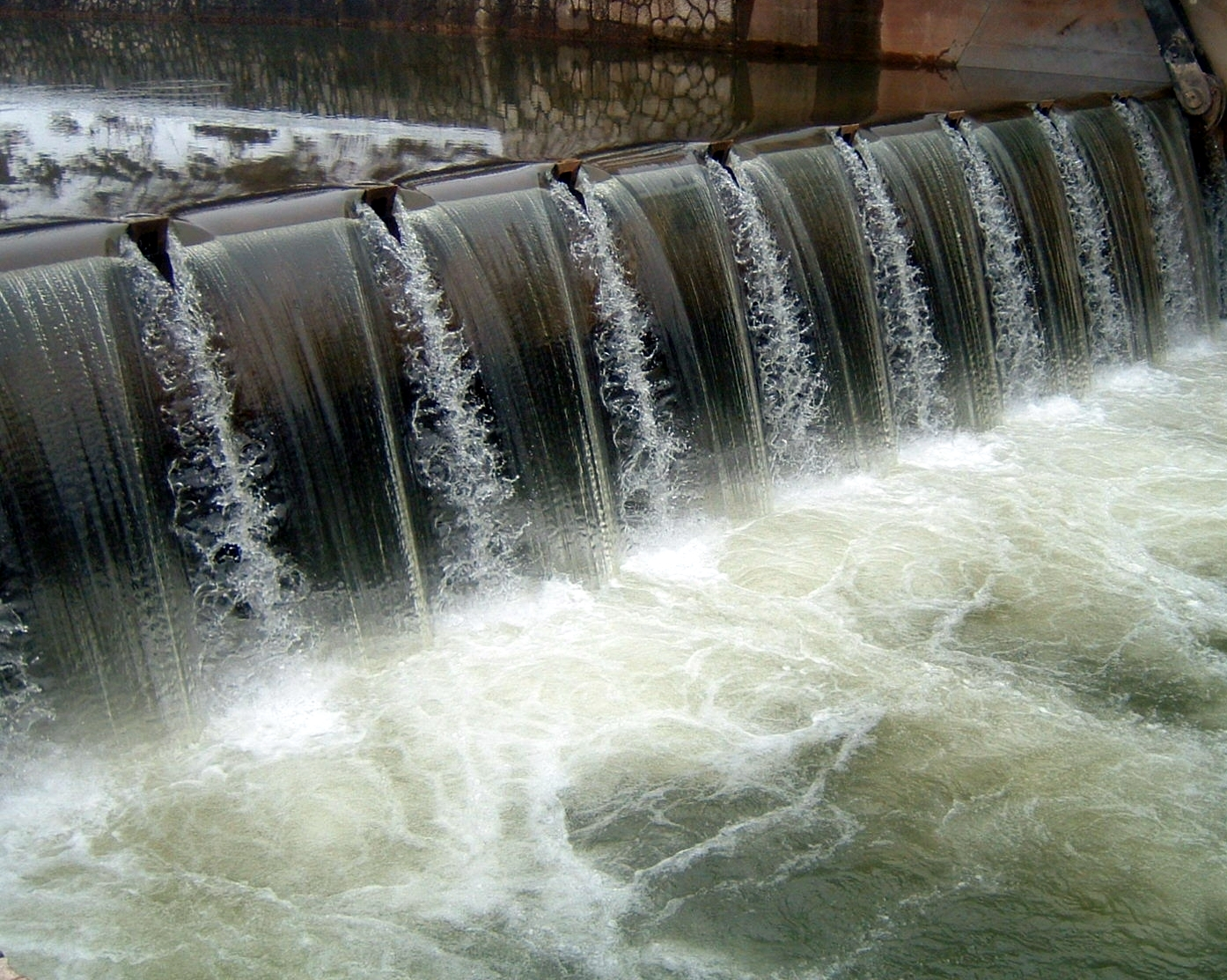 Water-gate on Miljacka River in Sarajevo, near Alifakovac.